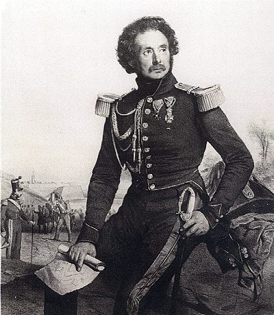 Remi De Puydt au Guatemala, avant 1830.